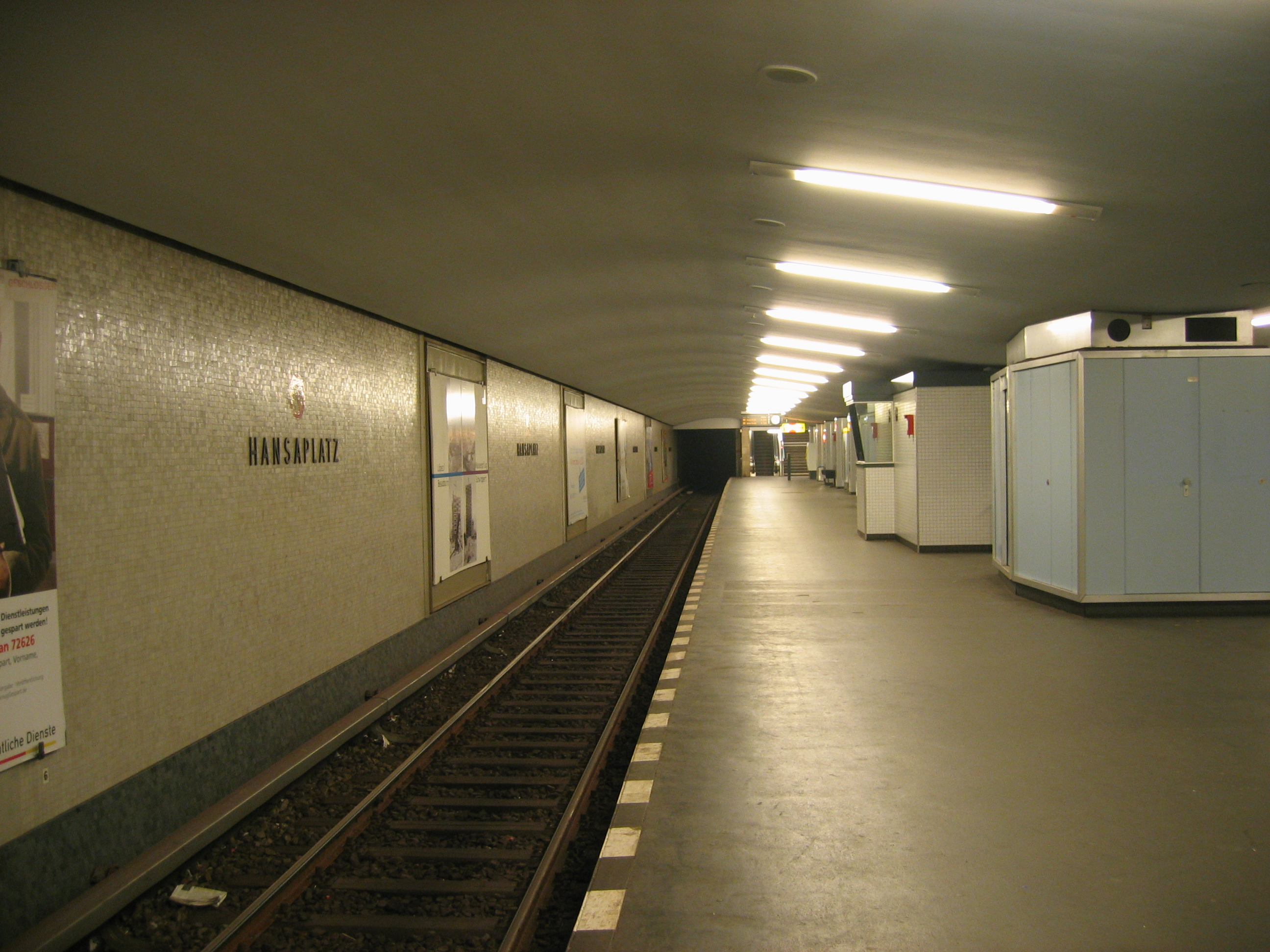 Der U-Bahnhof Hansaplatz in Berlin